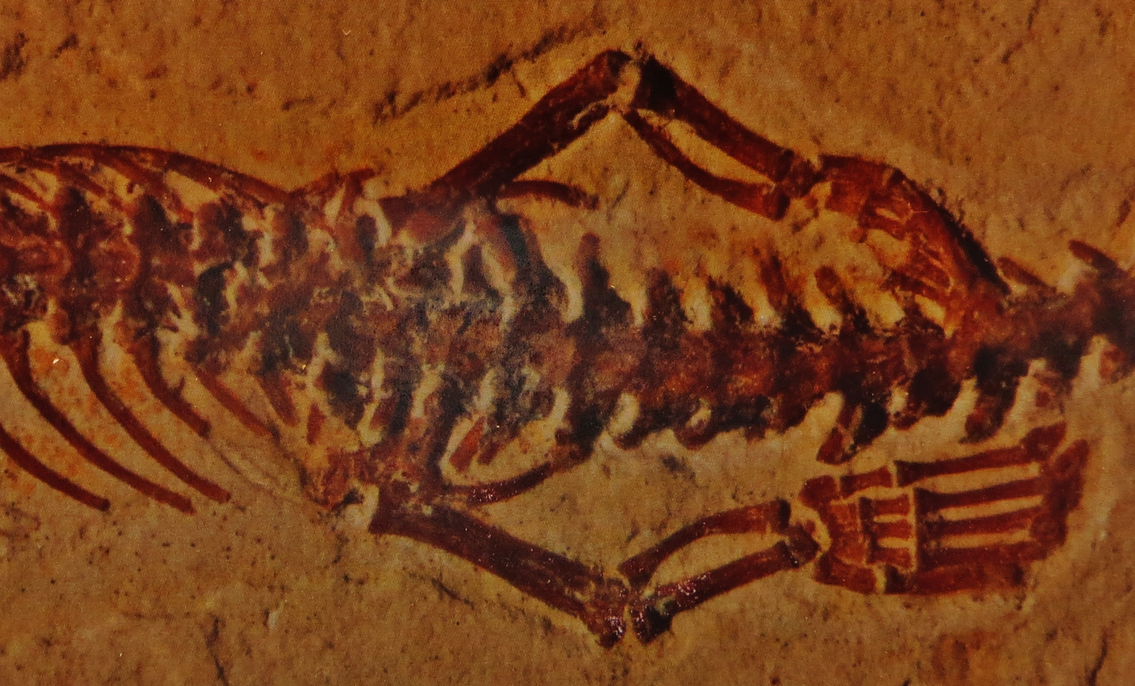 Took the picture at Burgmeister Muller Museum, Solnhofen